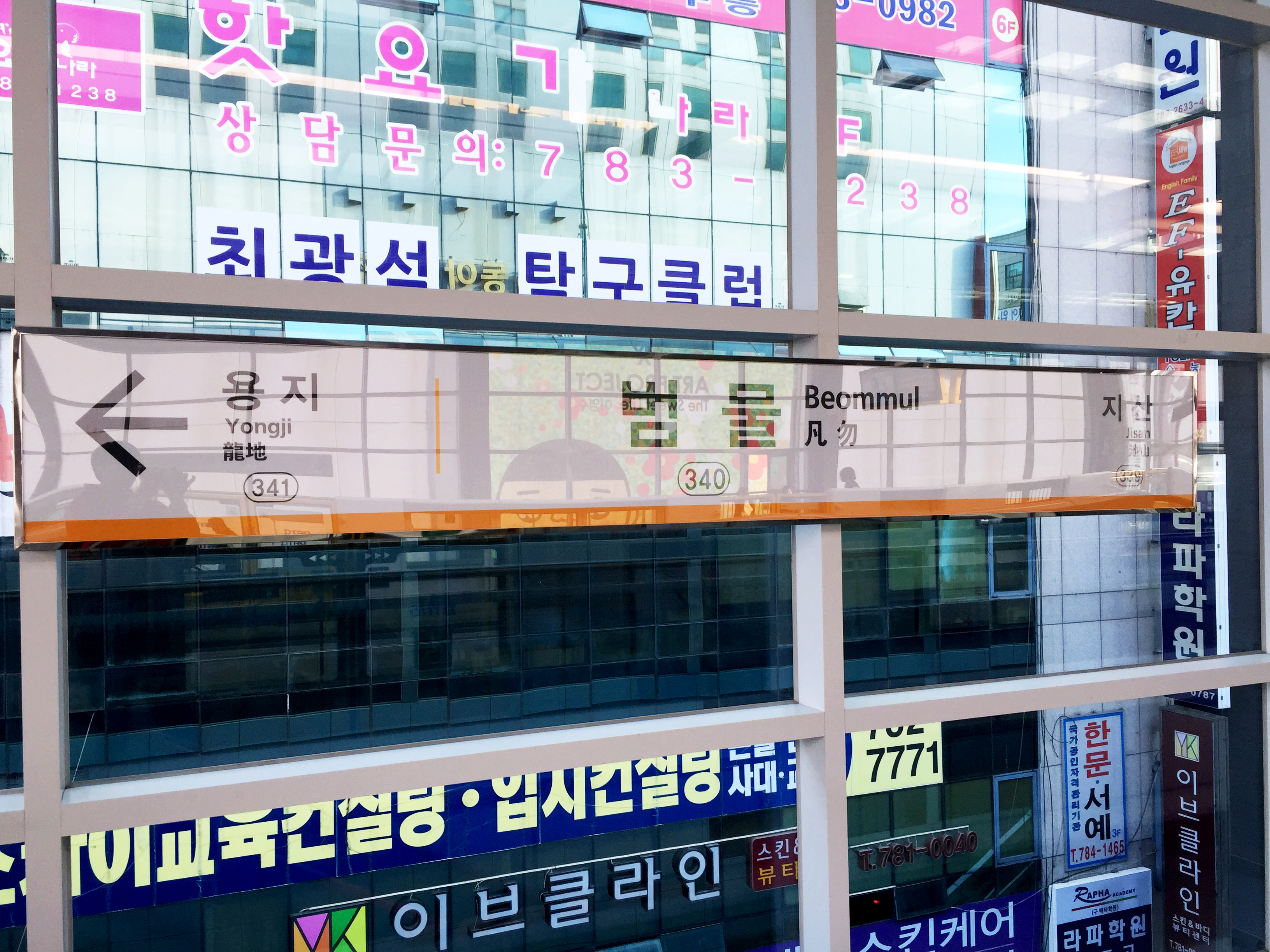 범물역 역명판